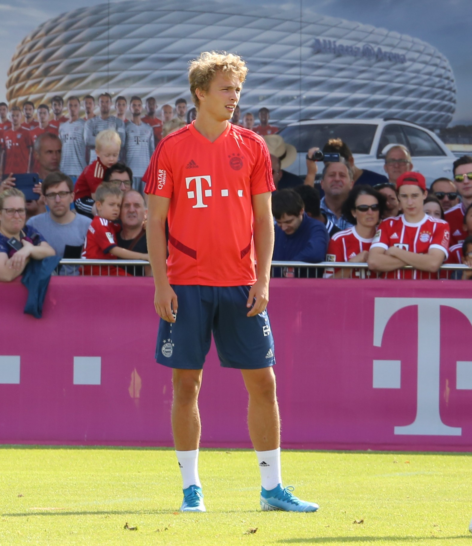 Fiete Arp, am 1. September 2019 beim Training auf dem Gelände des FC Bayern München